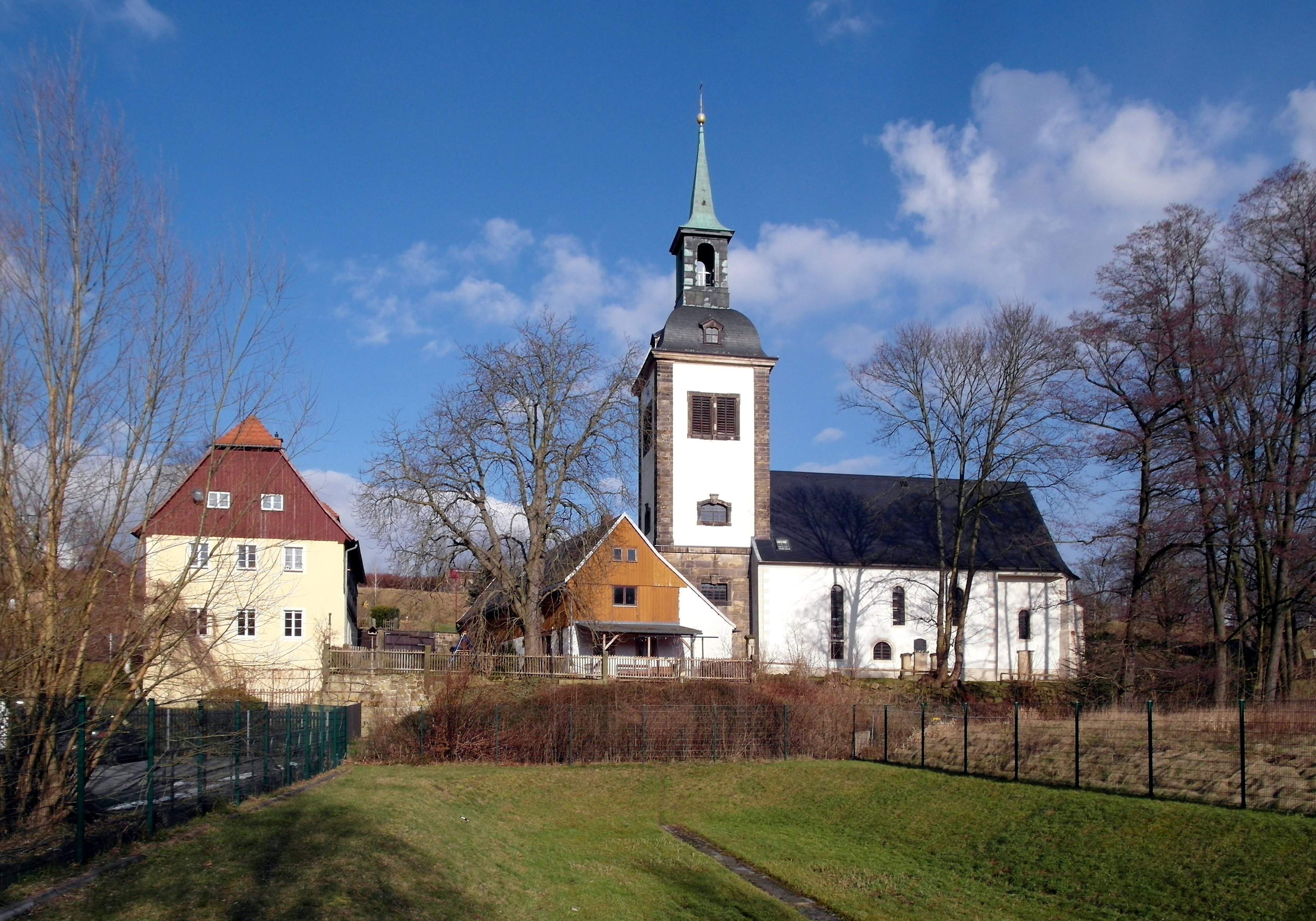 13.02.2018 01833 Dittersbach (Dürrröhrsdorf-Dittersbach), Hauptstraße 111: Evangelische Kirche (GMP: 51.036563,13.988027) mit dem Pfarrhaus. Nach dem Brand von 1660 wurde die 1662 heutige Kirche errichtet. Der Kirchturm wurde erst 1722 fertig. Innen eine Orgel von Gottfried Silbermann aus dem Jahre 1726. Sicht von Süden. [SAM3986.JPG]20180313300DR.JPG(c)Blobelt